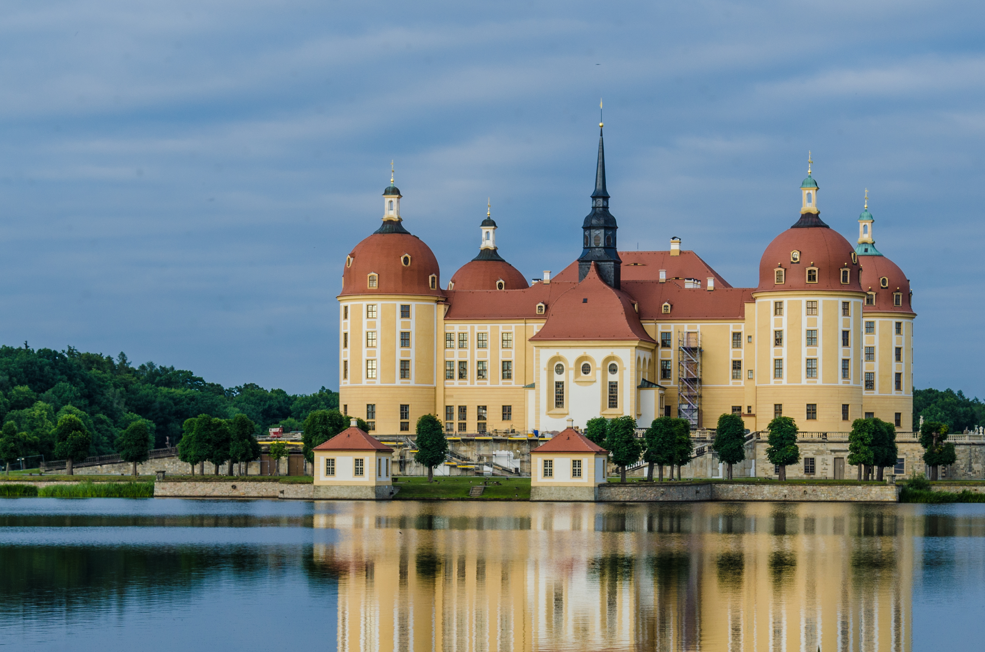 Schloss Mortizburg im Abendlicht